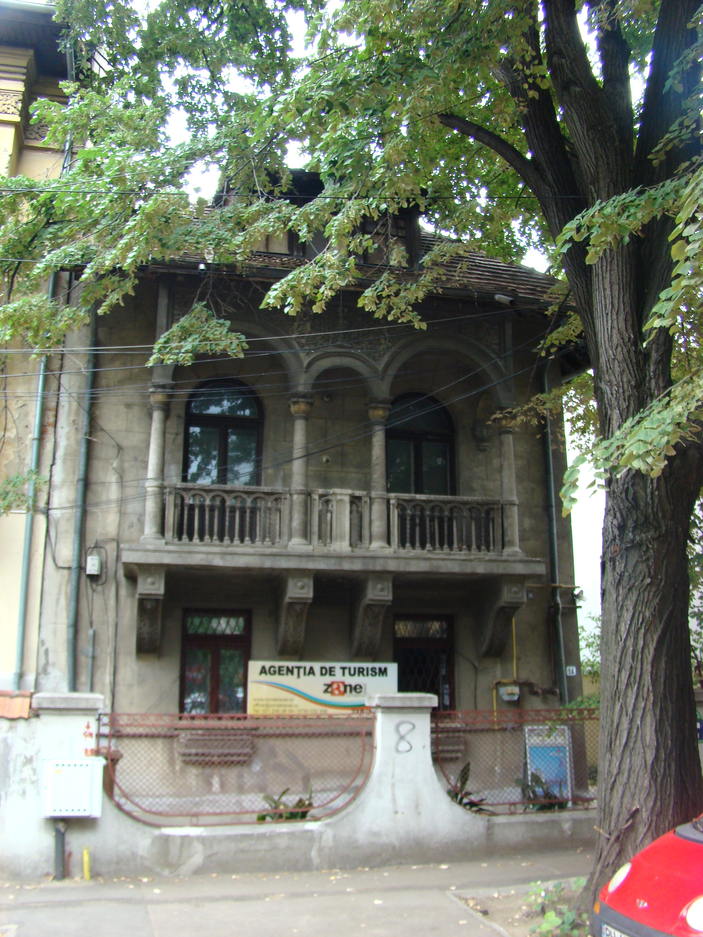 Casă monument istoric, str. Roma, nr. 14